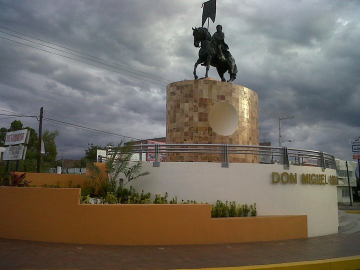 Glorieta a Miguel Hidalgo — Uriangato, Guanajuato.